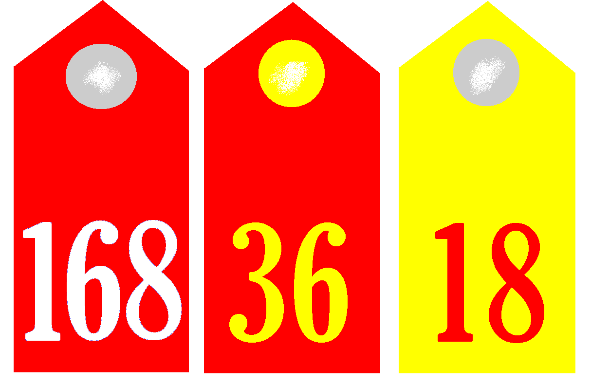 Schulterklappen InfRgt Nr. 168 - Füsilier Rgt Nr. 36 - InfRgt Nr. 18.